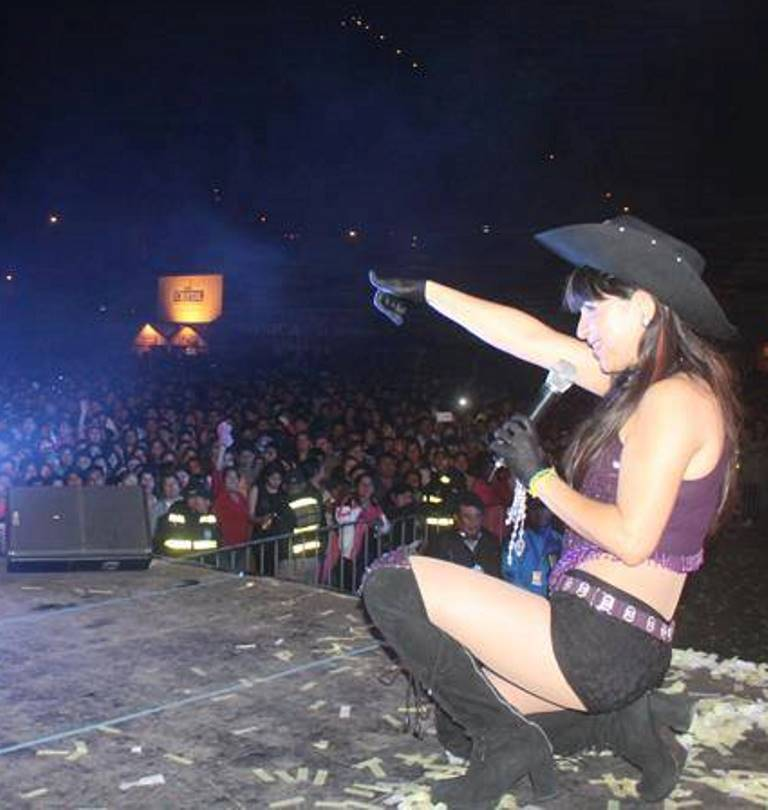 Rossy War en concierto en la ciudad de Lima